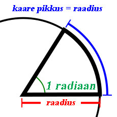 Radiaan eestikeelne joonis